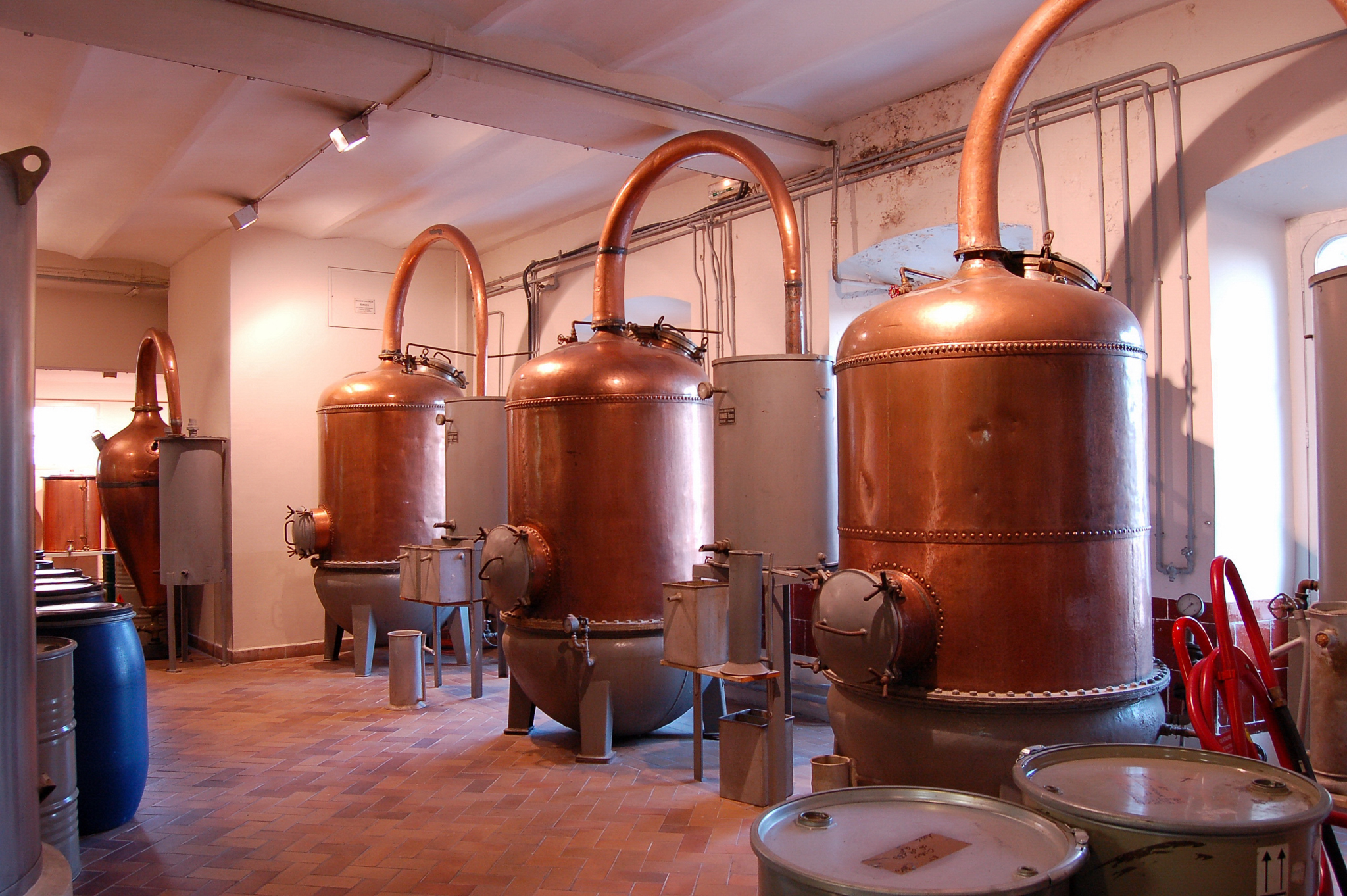 France - Grasse - Parfumerie Fragonard